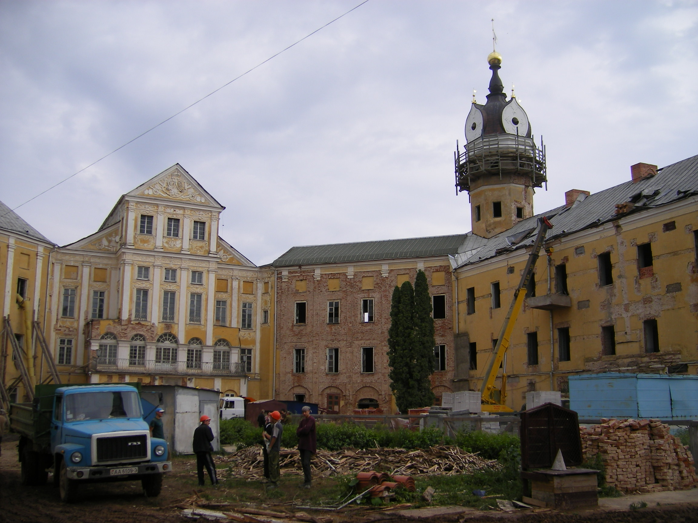 Radziwill Castle